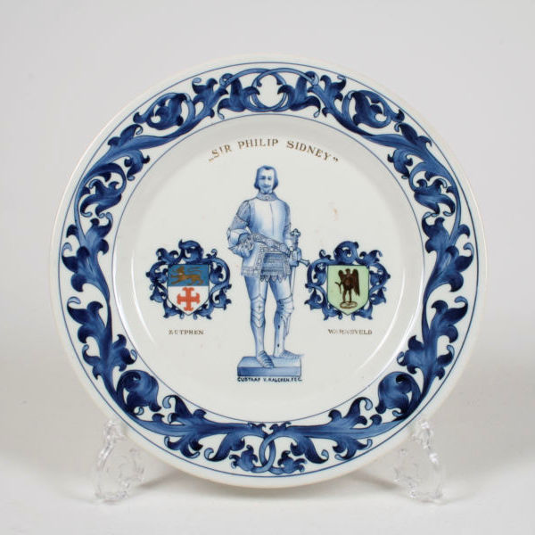 Wandbord met het gedenkteken voor Sir Philip Sidney. Wit met blauw, met polychrome wapens van Zutphen en Warnsveld. Vermoedelijk uitgegeven t.g.v. het Sidneymonument in 1913. Signatuur: Gustaaf van Kalcken Fec. Gemerkt: Delft P.B.etc.